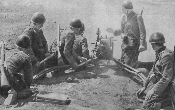 Russia, un pezzo di anticarro della Divisione "Sforzesca" spara contro il nemico